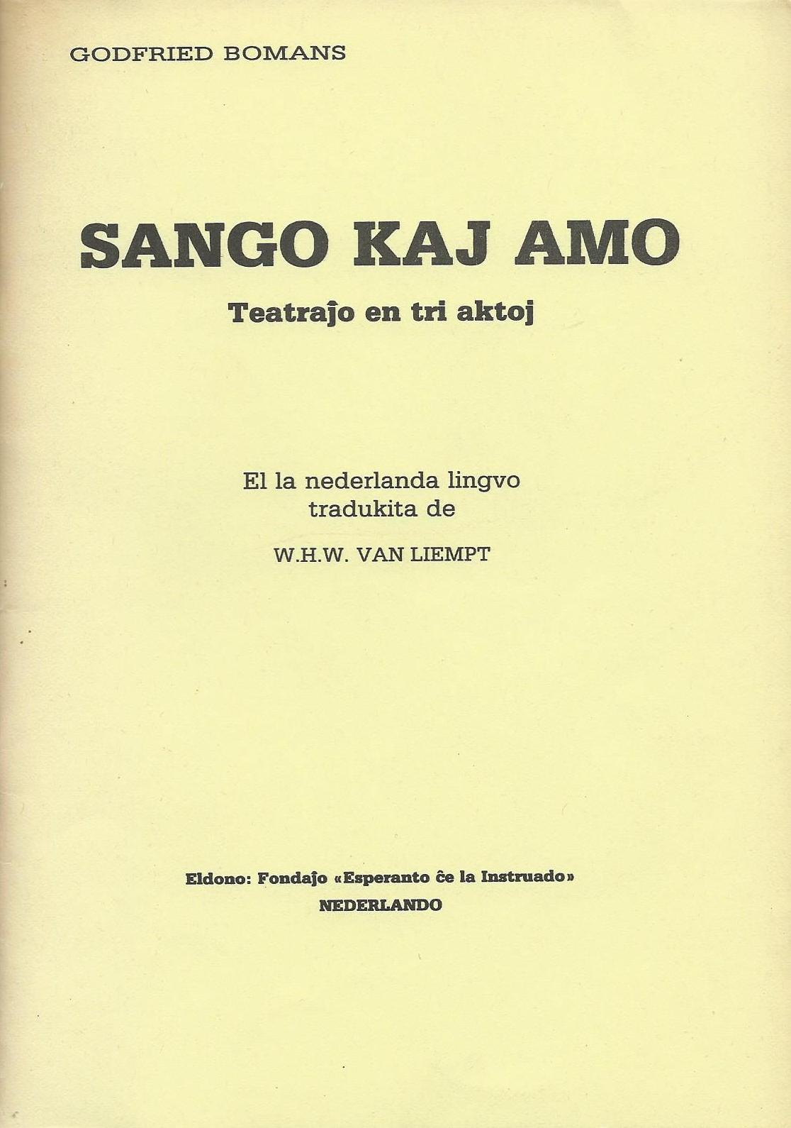 kovrilo de "Sango kaj Amo", 1980